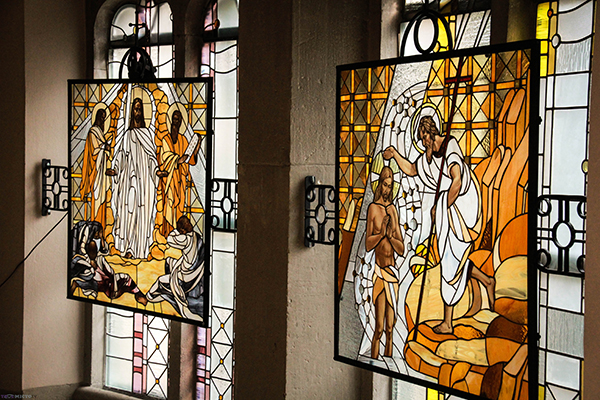 Вітражні комозиції львівських митців Личка та Павельчука